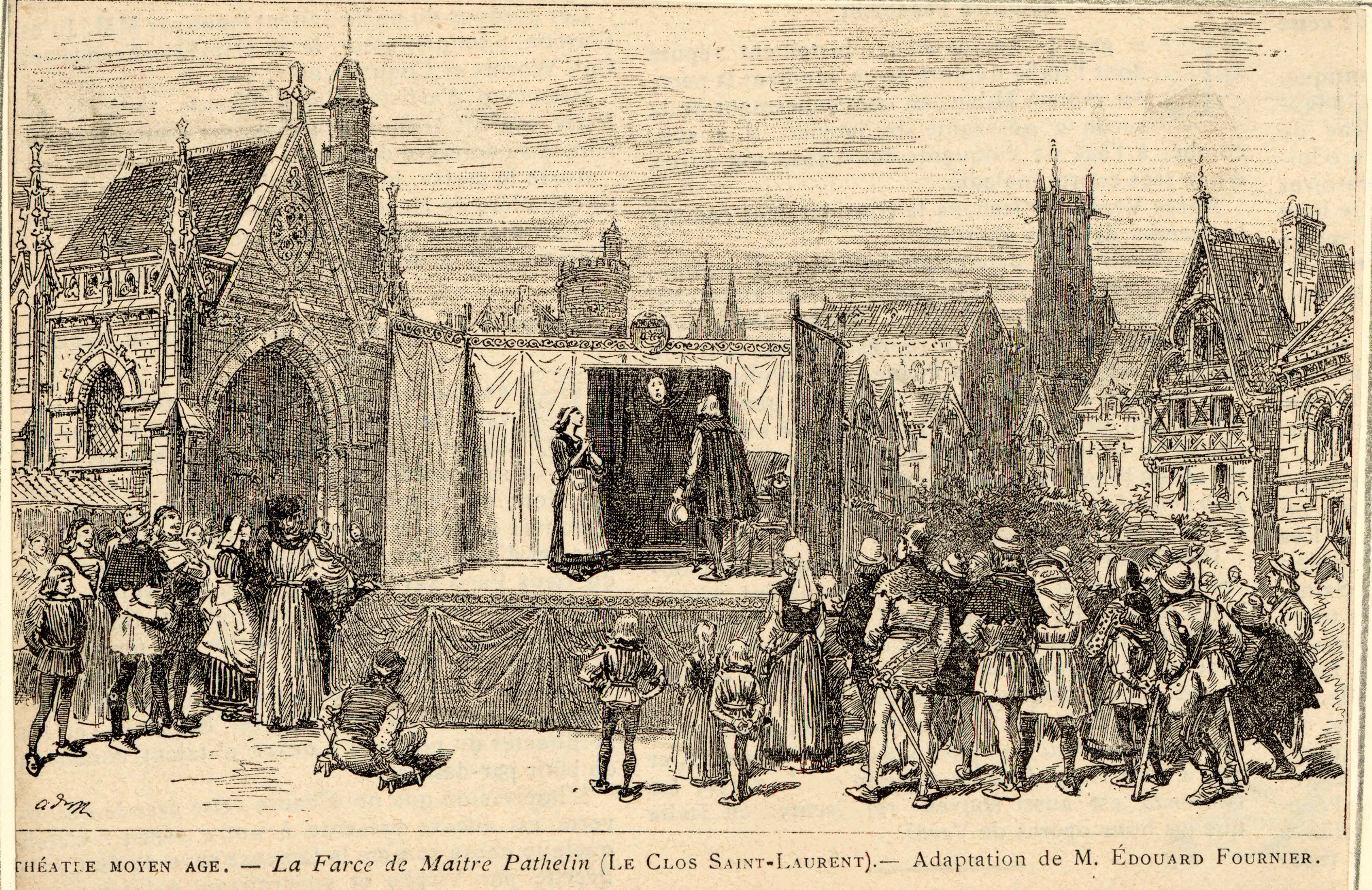 Théâtre Moyen Âge - La farce de maître Patelin